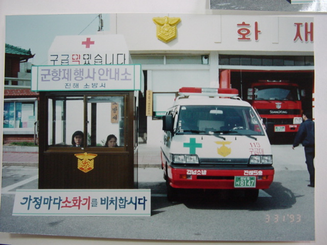 경상남도 소방 역사사진